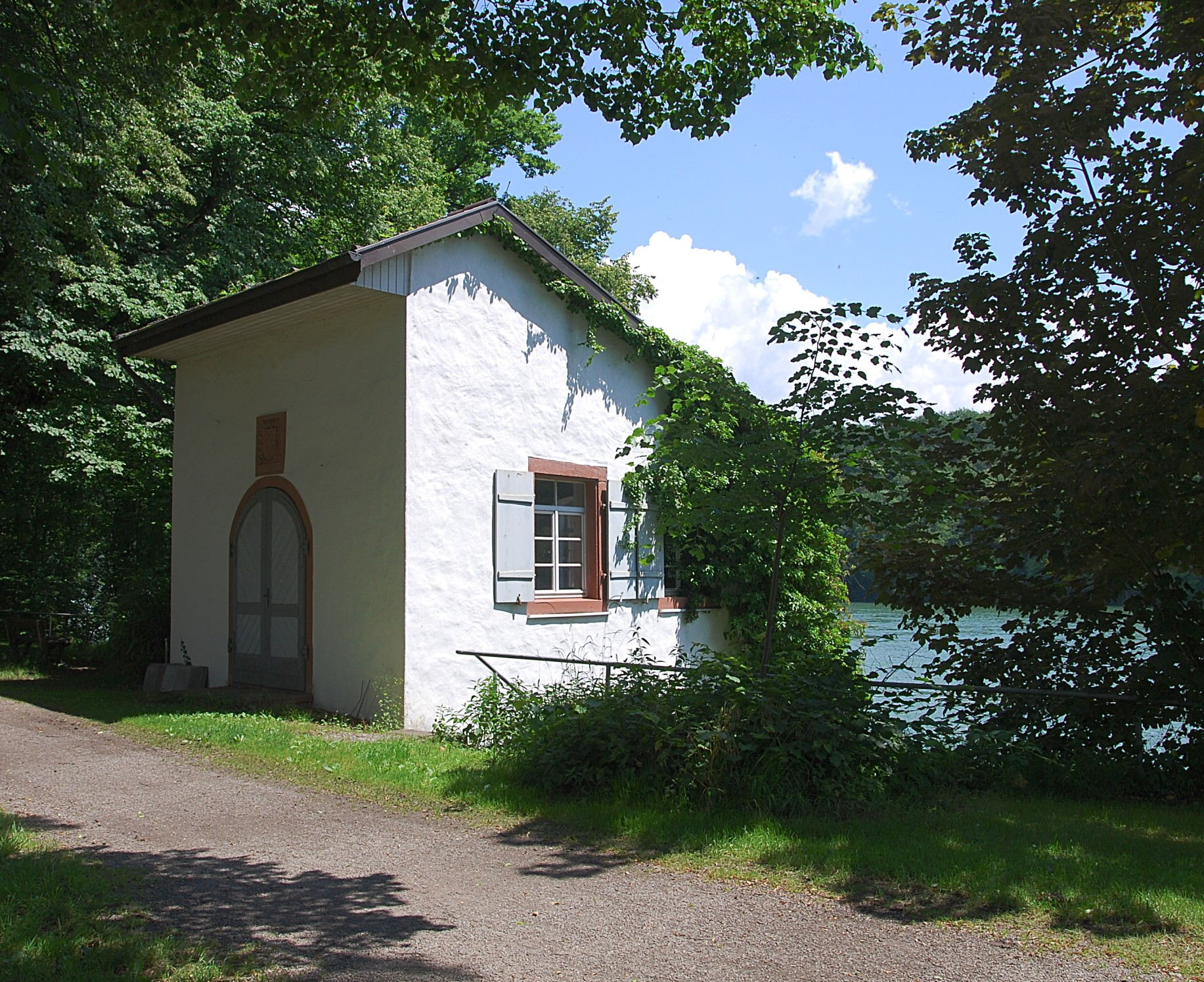 Schloss Beuggen: Teehaus